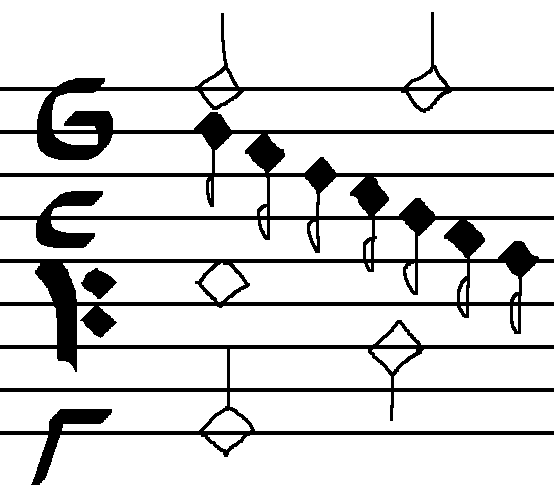 Notensystem mit mehr als 5 Linien und mehreren Schlüsseln erstellt von Mezzofortist mit The Gimp